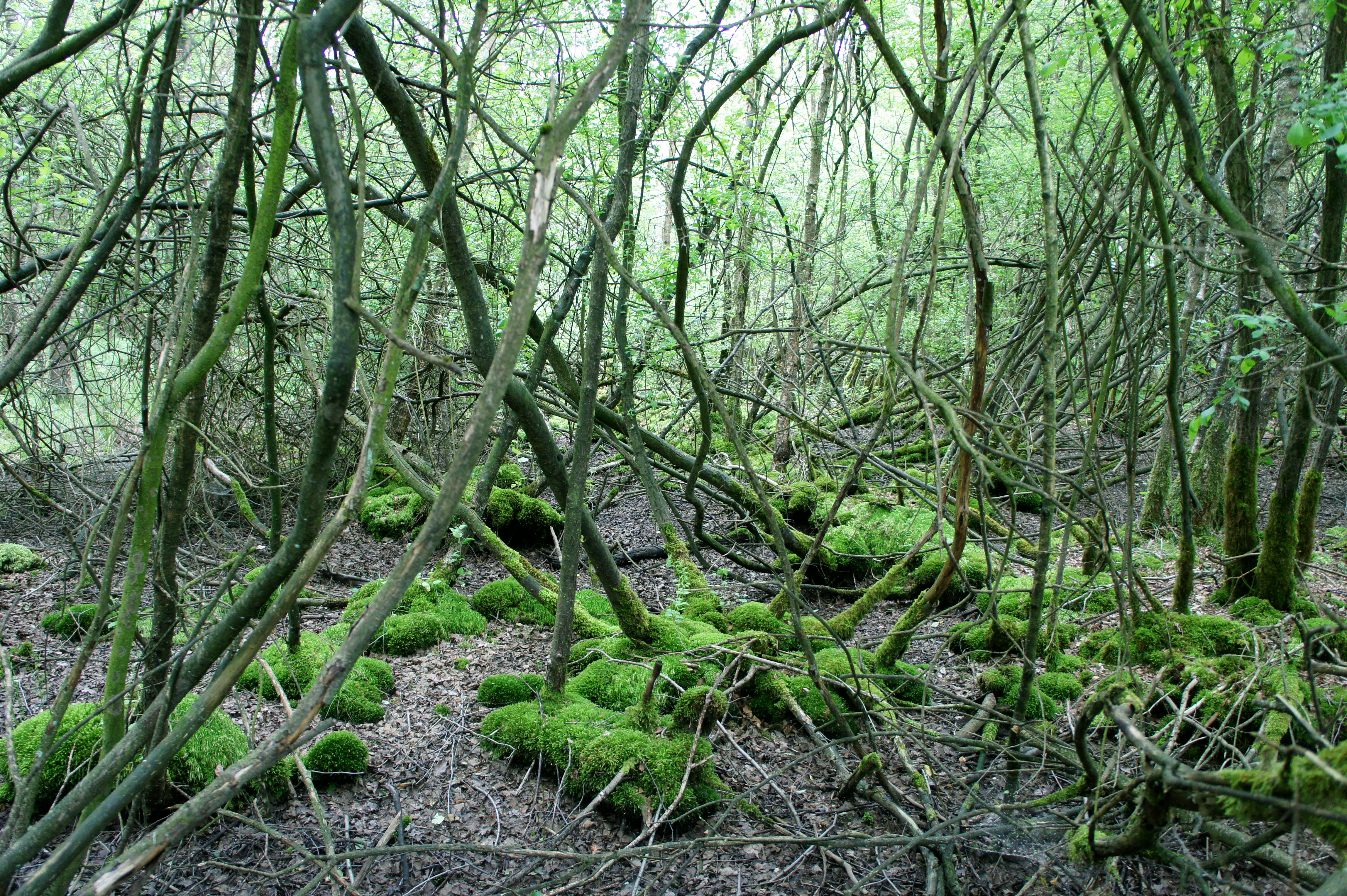 Blick ins Naturschutzgebiet WE079 Huntloser Moor